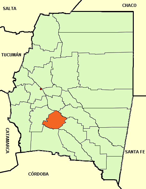 Departamento Mapa editado de: Santiago del Estero province (Argentina), departments and capital.png